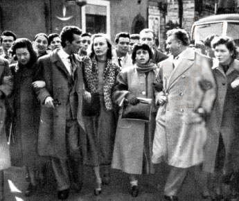 manifestazione a favore del cinema italiano, Roma, 20 febbraio 1949. In prima fila, da sinistra. Maria Michi, Leonardo Cortese, Irasema Dillian, Anna Magnani, Gino Cervi, Carla Del Poggio